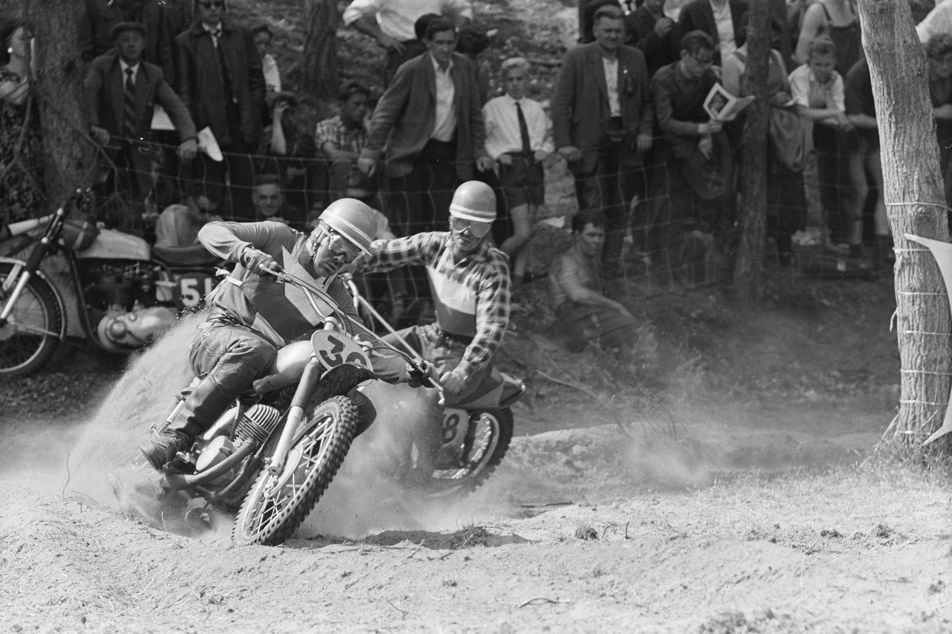 Collectie / Archief : Fotocollectie Anefo Reportage / Serie : [ onbekend ] Beschrijving : Grand Prix Motor Cross te Schijndel. Tijdens de eerste manche v.l.n.r. no. 39 Torsten Hallman , no. 38 Vlastimil Valek , Frits Selling / Datum : 9 juni 1963 Locatie : Rusland, Schijndel Trefwoorden : motorraces Persoonsnaam : Frits Selling, Hallmann, Torsten, Vlastimil, Valek Fotograaf : Pot, Harry / Anefo Auteursrechthebbende : Nationaal Archief Materiaalsoort : Negatief (zwart/wit) Nummer archiefinventaris : bekijk toegang 2.24.01.05 Bestanddeelnummer : 915-2388